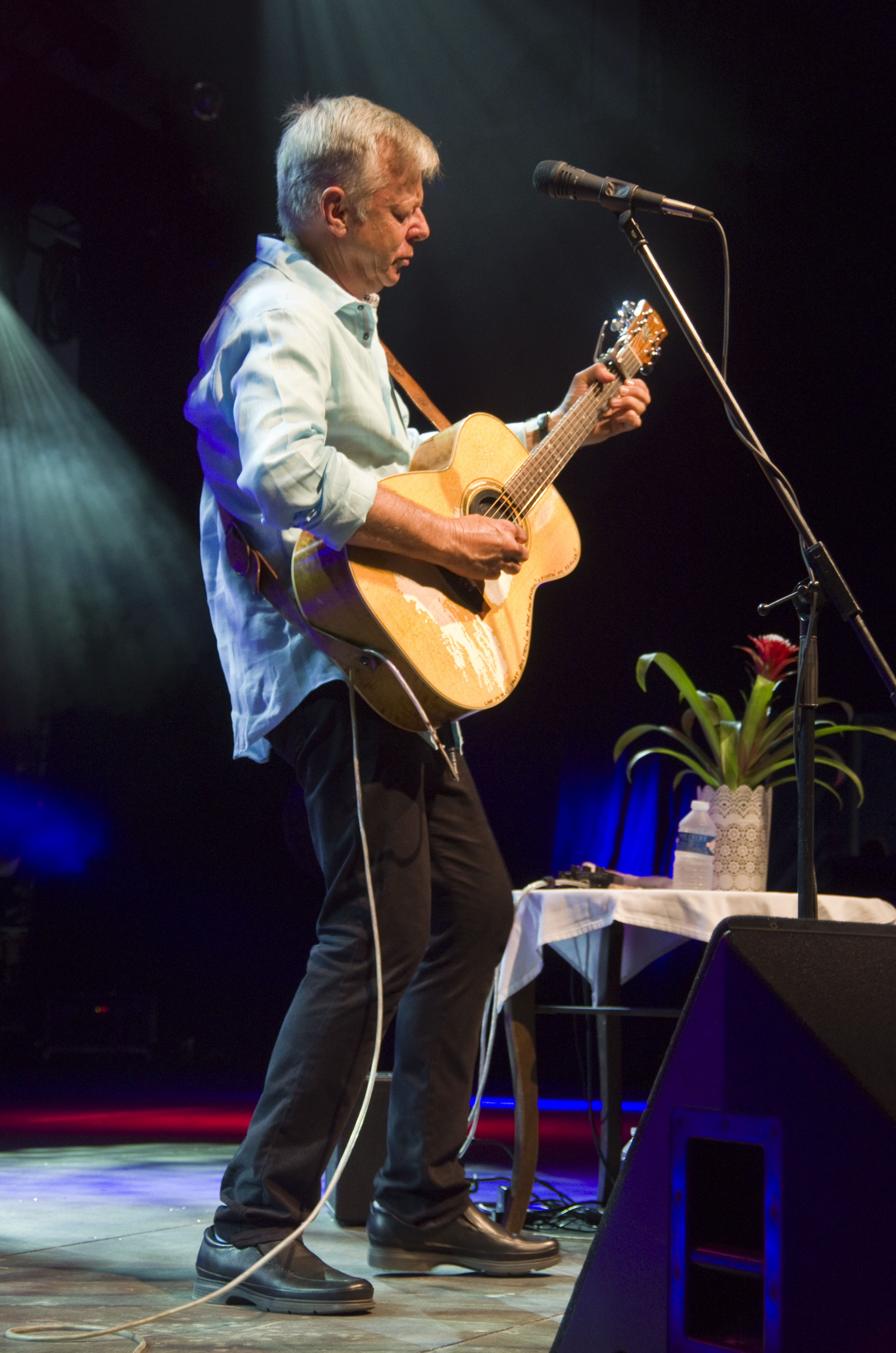 Das Zelt-Musik-Festival 2015 in Freiburg im Breisgau. 05.07.2015 Tommy Emmanuel